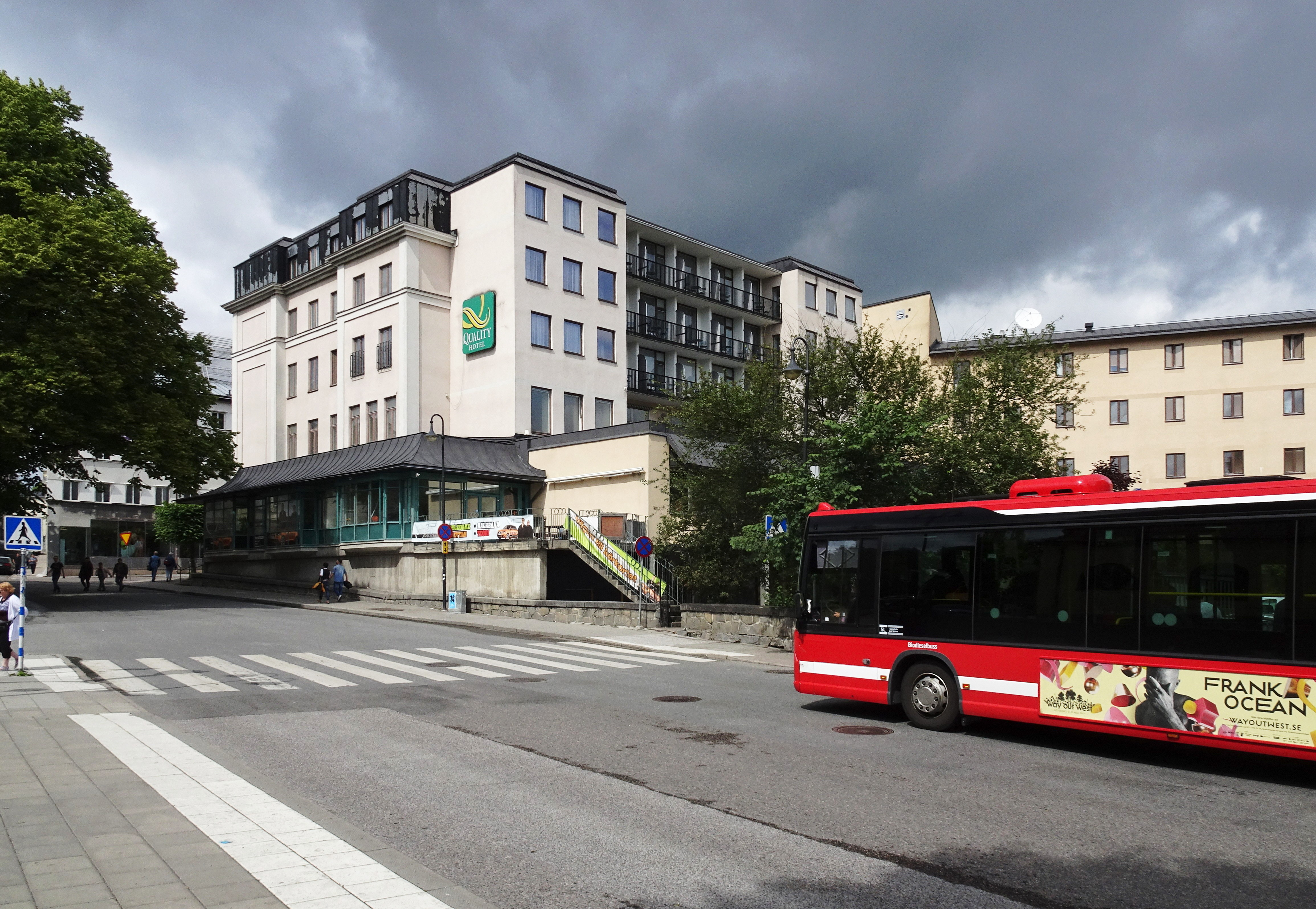 Före detta Södertälje stadshotell